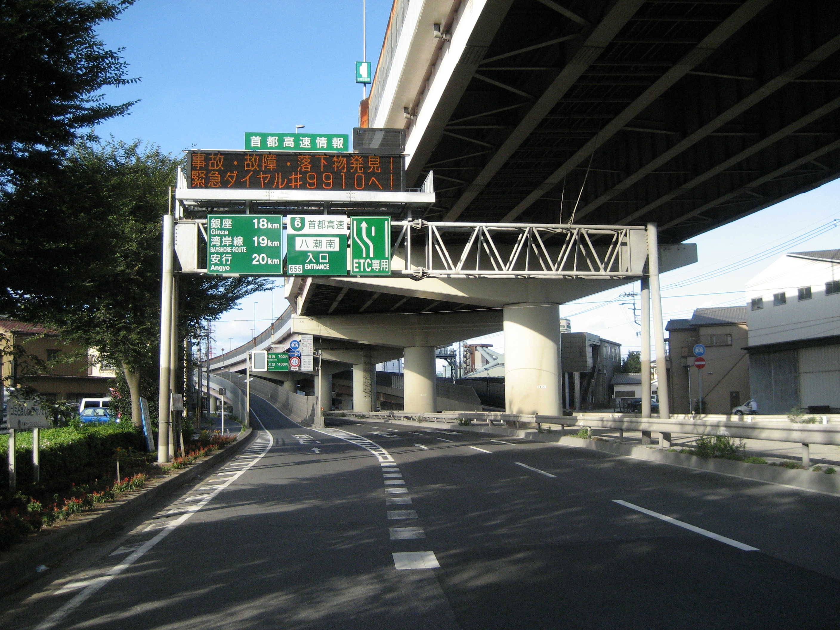 首都高速６号三郷線八潮南インターチェンジ東京方面入り口